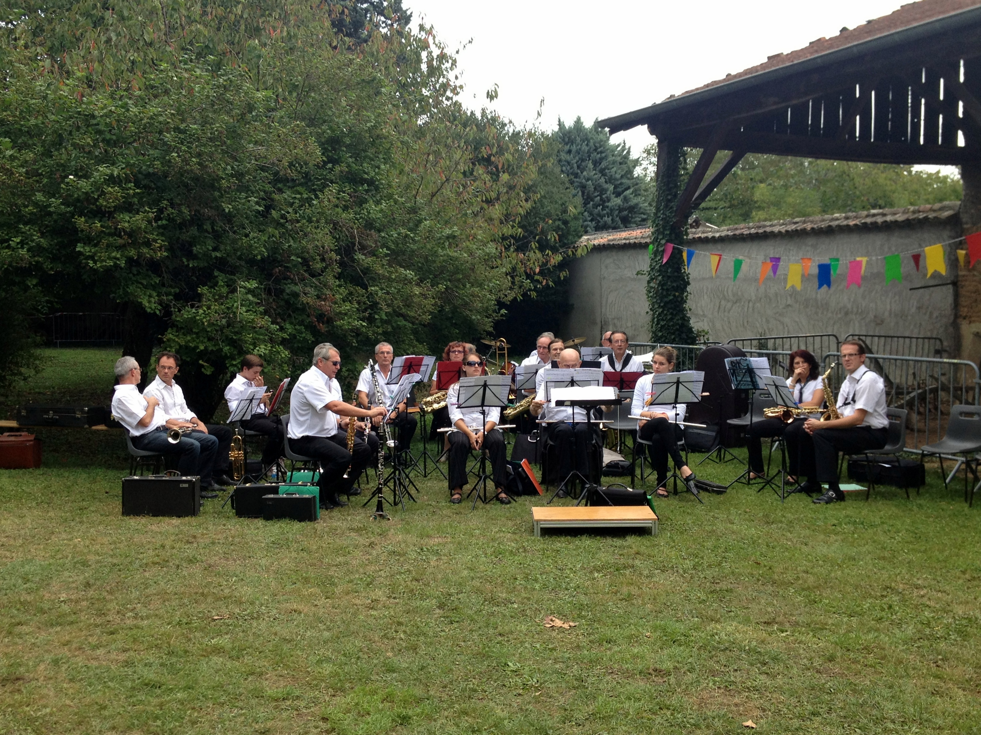 Maison Delorme à Beynost : journées du patrimoine 2013. Personality rights warningAlthough this work is freely licensed or in the public domain, the person(s) shown may have rights that legally restrict certain re-uses unless those depicted consent to such uses. In these cases, a model release or other evidence of consent could protect you from infringement claims.